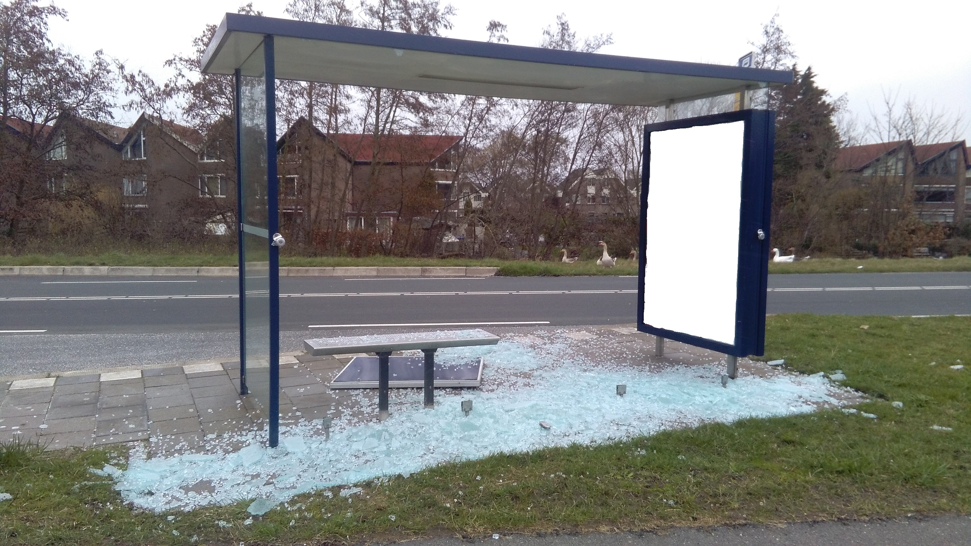 Bushokje aan de Zuiderdracht in Julianadorp waarvan alle ramen zijn ingeslagen.